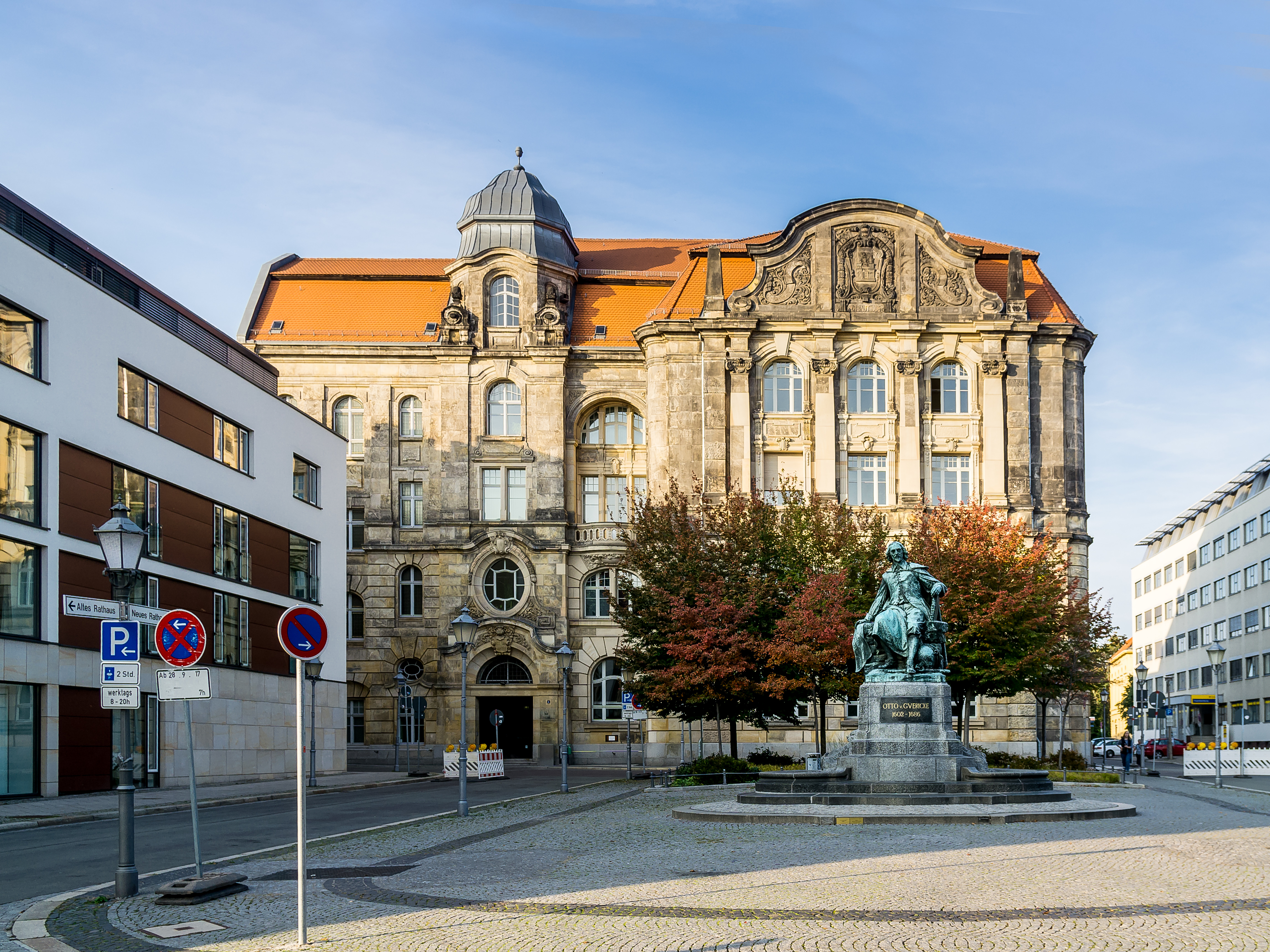 Denkmal für Otto von Guericke, Bei der Hauptwache in Magdeburg Stt Magdeburger Altstadt. Im Hintergrund das Bankgebäude des Sparkassen- und Giroverbandes für Sachsen, Thüringen und Anhalt (Neues Rathaus in Magdeburg) This is a picture of the Baudenkmal (cultural heritage monument) according to the Cultural Heritage Protection Law of Saxony-Anhalt with the ID 094 06145